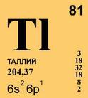 Таллий